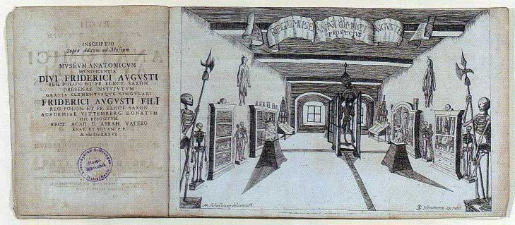 Anatomische Saal zu Wittenberg aus „Catalogus universalis“ von dem Kupferstecher J. G. Schumann nach einer Zeichnung von dem Wittenberger Maler Michael Adolph Siebenhaar eigenes Archivbild